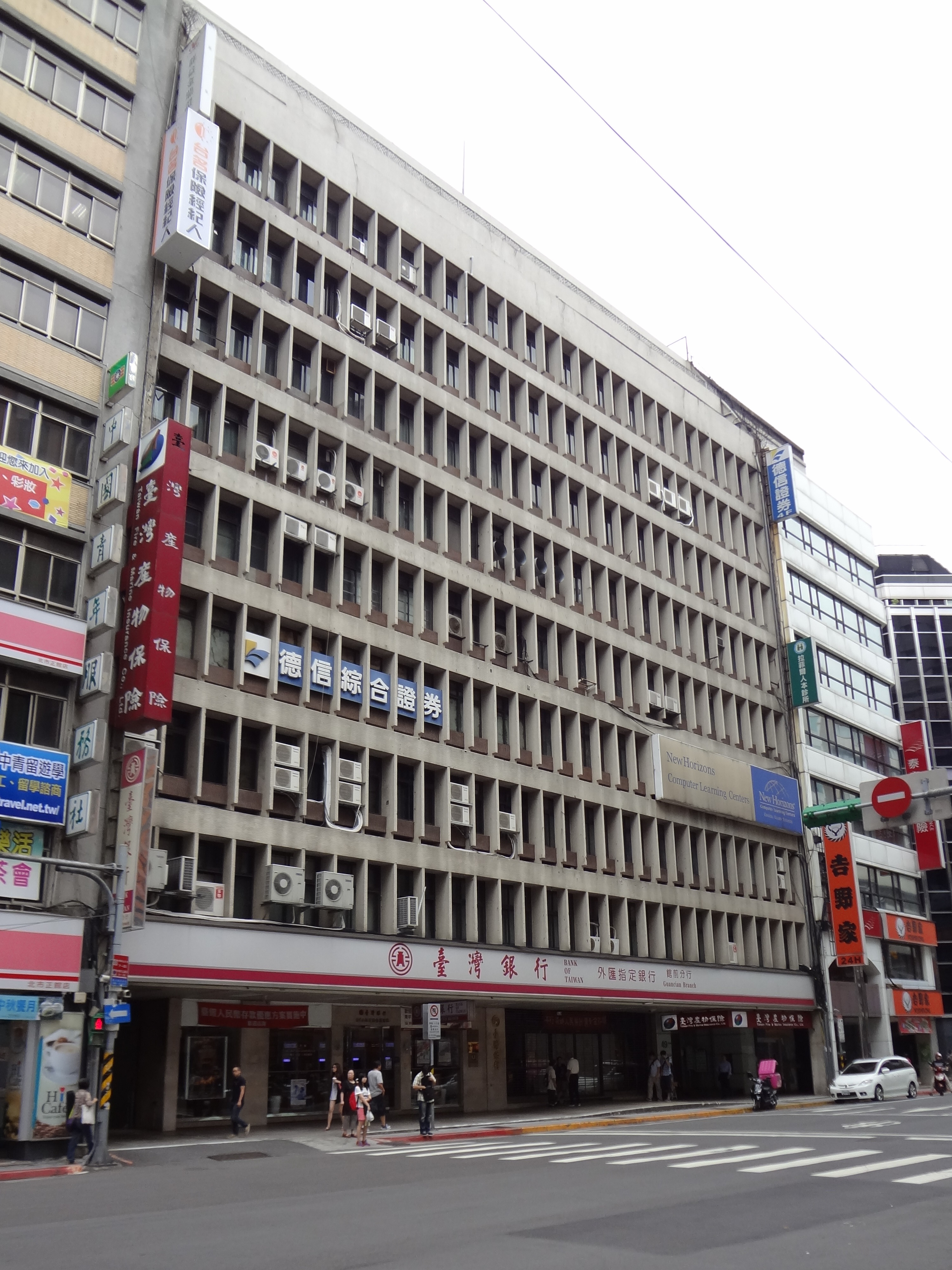 臺灣產物保險懷德大樓，位於臺北市中正區館前路49號。